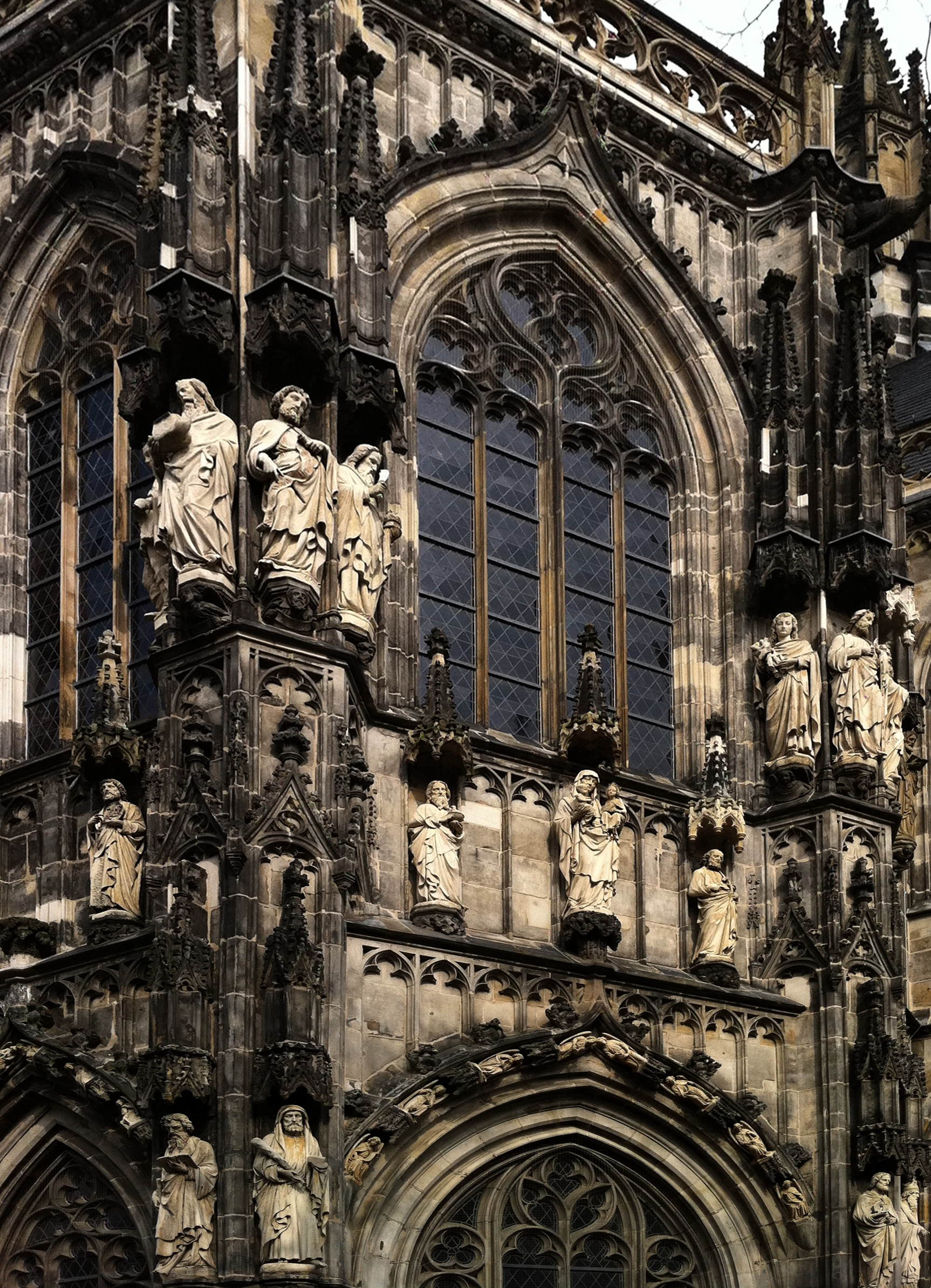 Detail der Annakapelle des Aachener Domes mit dem Figurenschmuck von Gottfried Götting aus Savonnières-Kalkstein